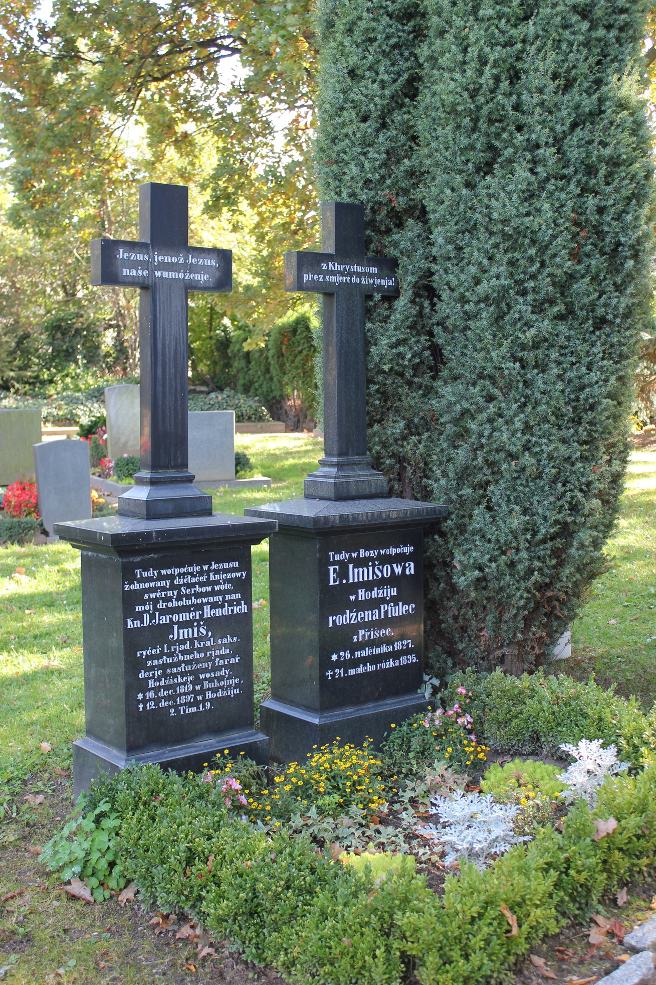 Hornjoserbsce: Row Jaroměra Hendricha Imiša na Hodźijskim kěrchowje.